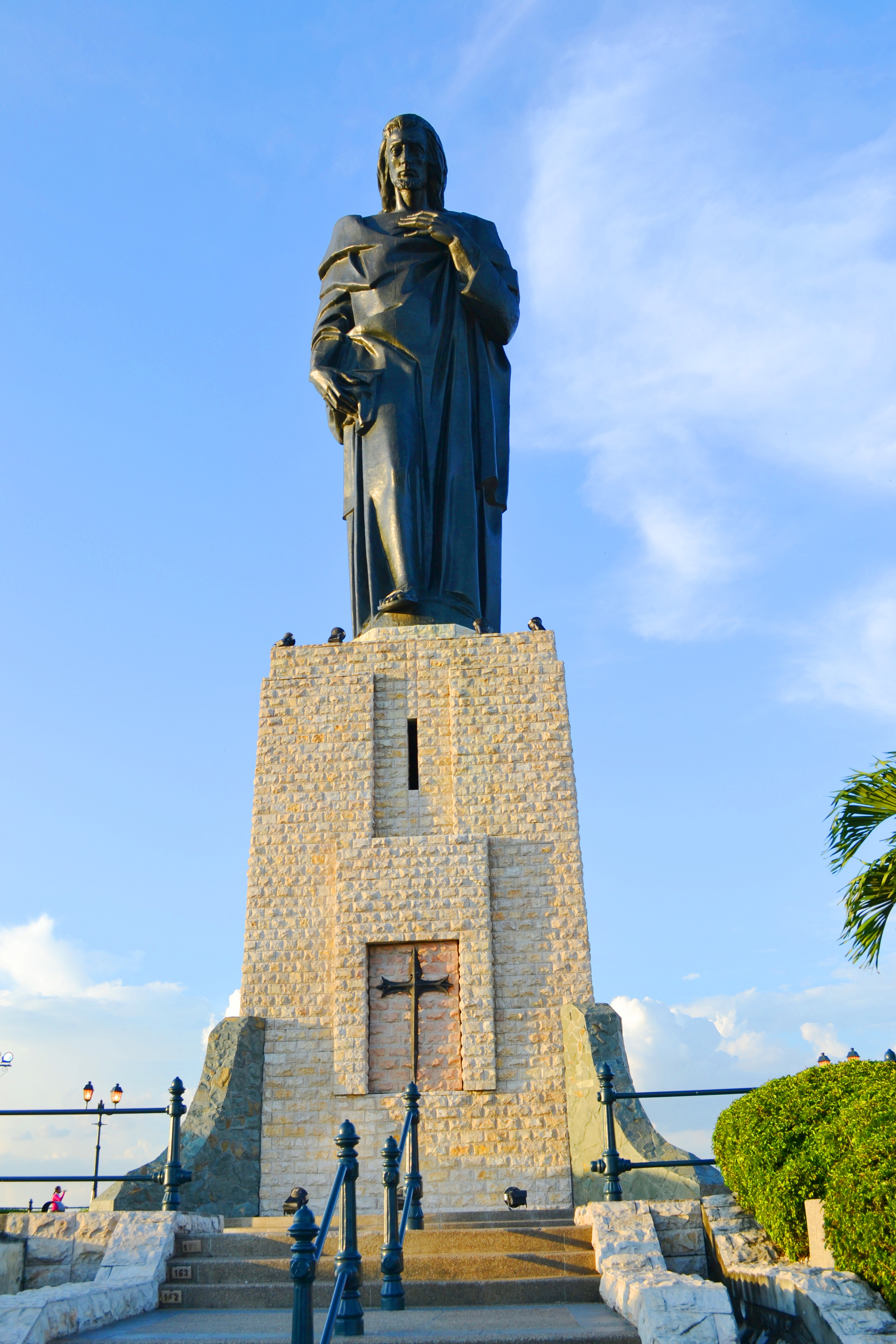 Monumento al Sagrado Corazón de Jesús de Guayaquil, en el Cerro del Carmen. Vista frontal.